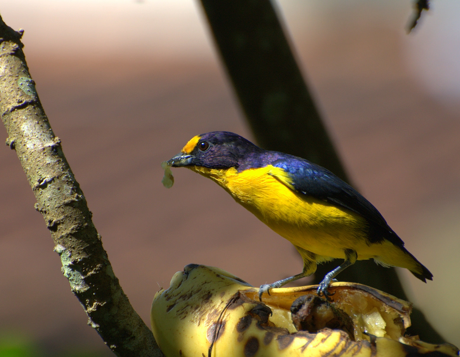 No quintal da casa da minha sogra na cidade de Registro-SP